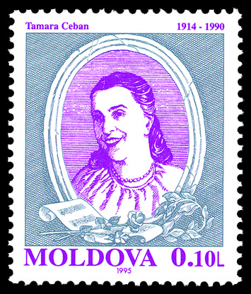 Tamara Ceban (1914-1990). Folk-music singer.